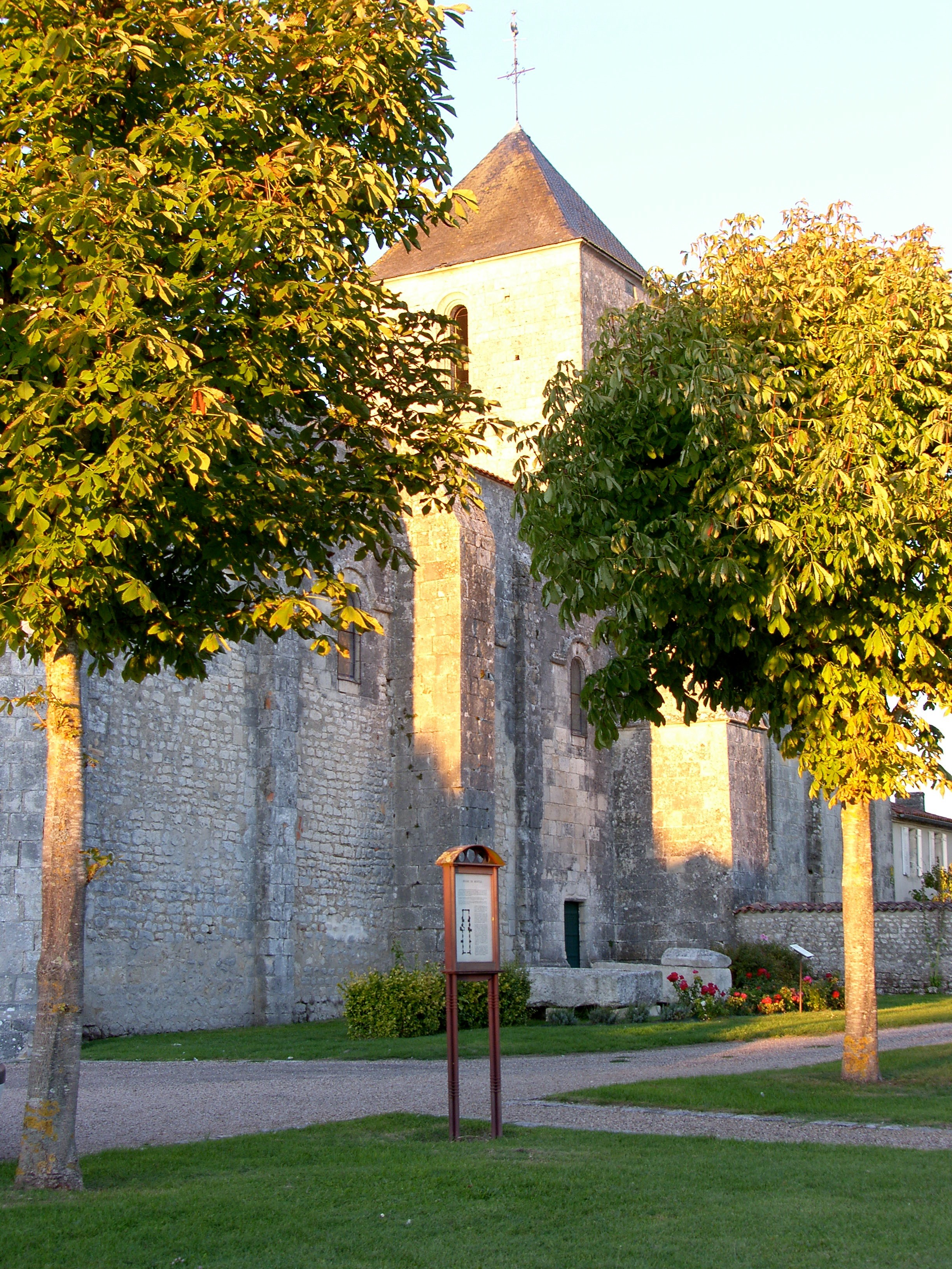 Eglise Saint-Sulpice de Montils (Charente-Maritime).